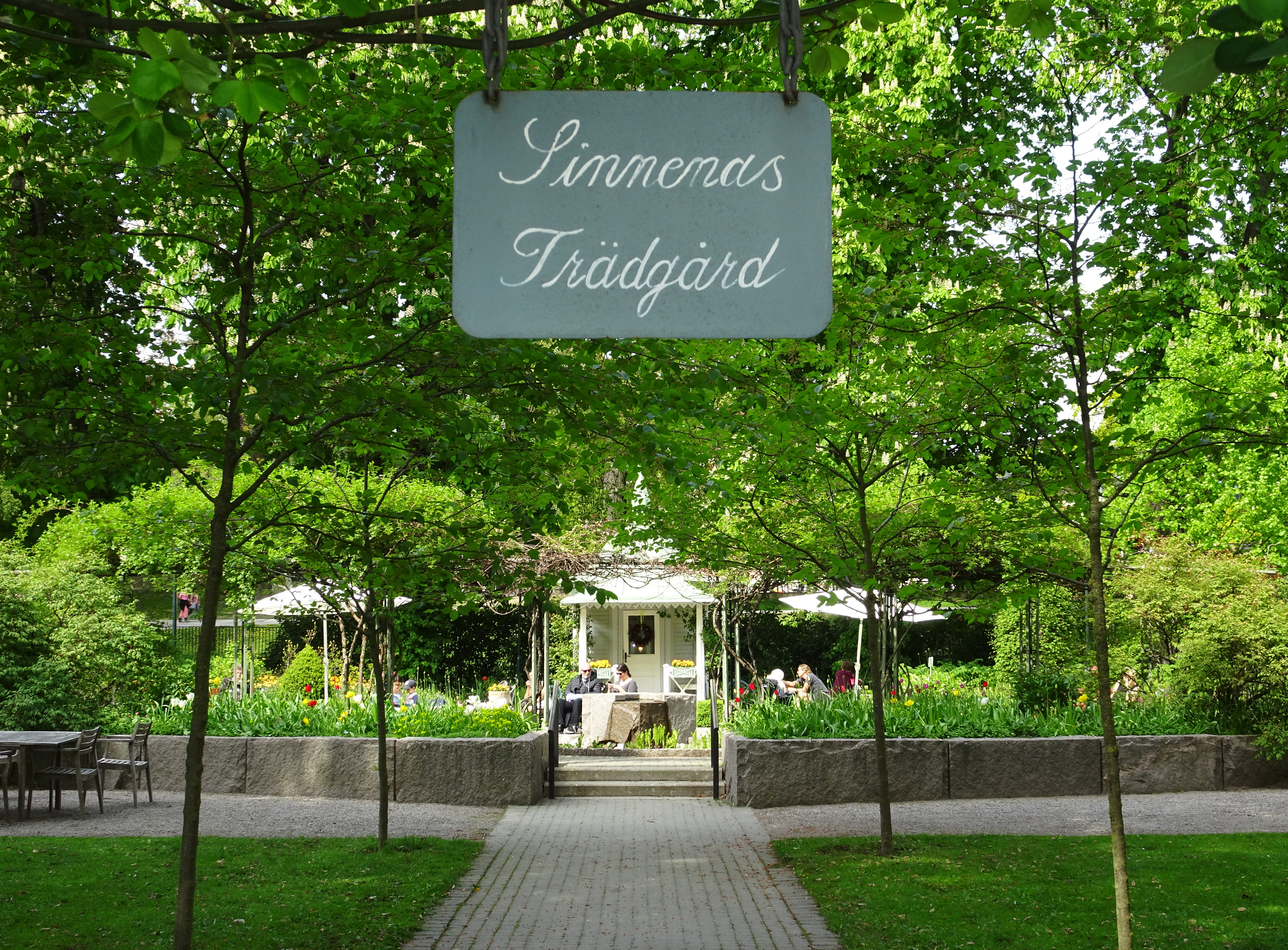 Sinnenas trädgård, Sabbatsberg, park med lusthus från 1784